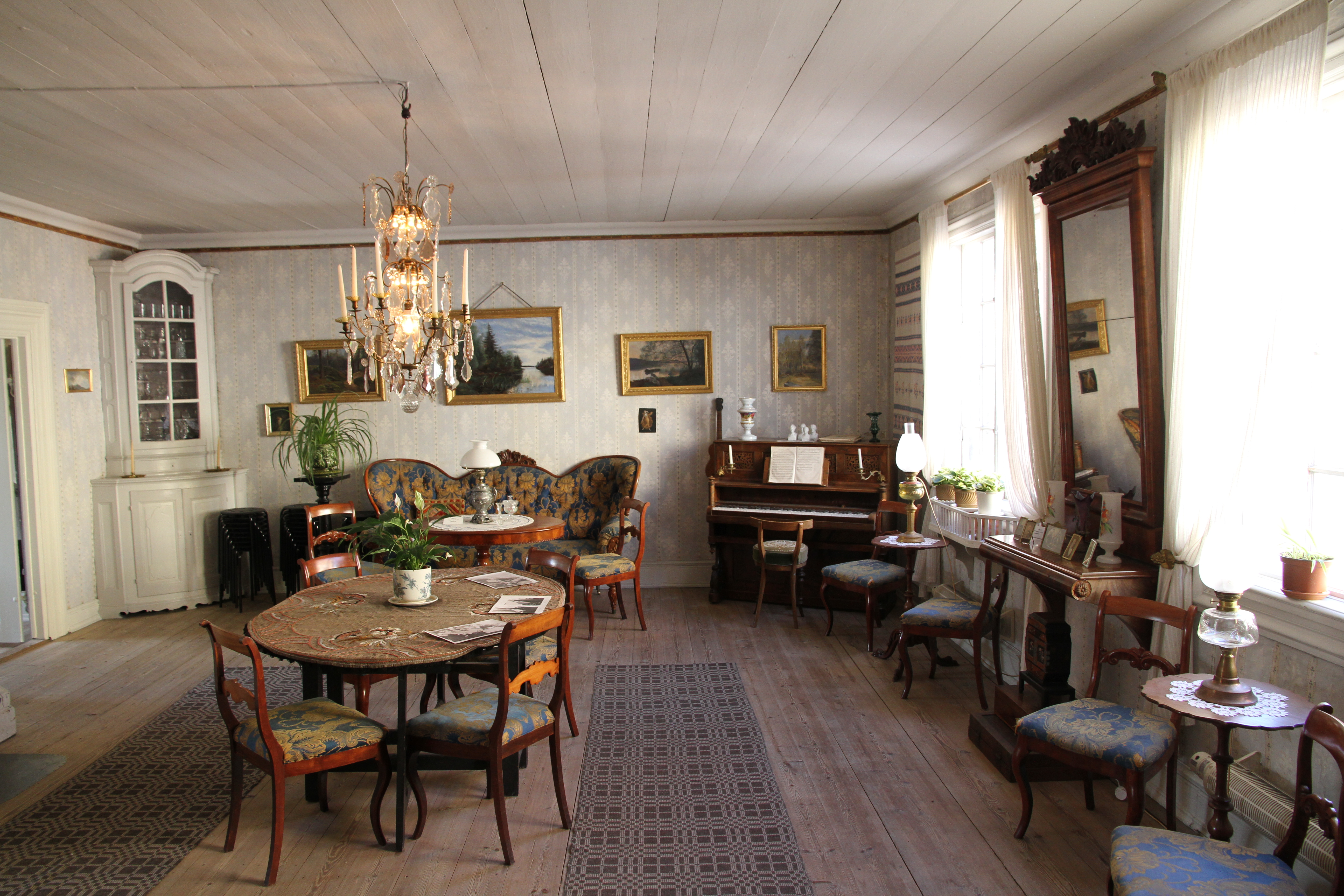 Skottbergska gården, Karlshamn 17 juli 2014